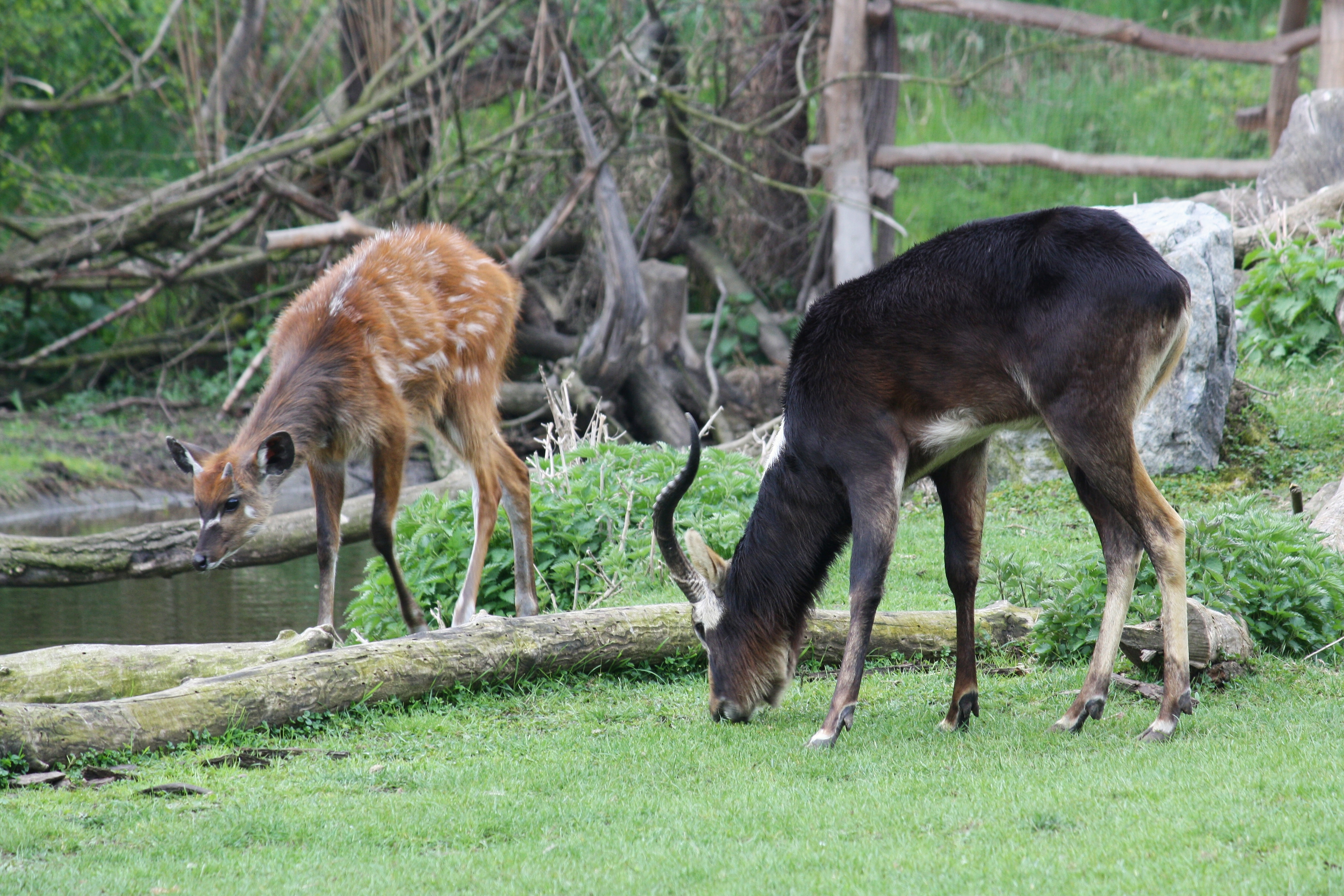 Zoo Praha